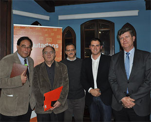 Francesc de Carreras, Ricardo García Cárcel, Antonio Espinosa, Albert Rivera y Matías Alonso, secretario general de Ciudadanos-Partido de la Ciudadanía